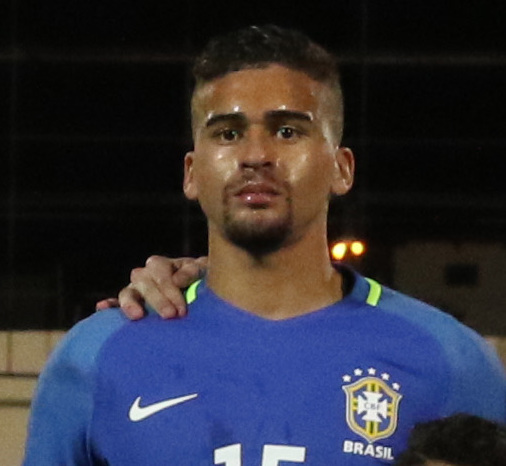 Riobamba, Ecuador, 18 enero 2017 (Andes).- El combinado ecuatoriano dirigido por Javier Rodríguez cayó 1-0 este miércoles ante Brasil en el marco de la primera jornada del Grupo A del Campeonato Sudamericano Sub 20 Ecuador 2017, durante el partido jugado en el estadio Olímpico de Riobamba (centro andino), abarrotado de hinchas. ANDES/Micaela Ayala V.